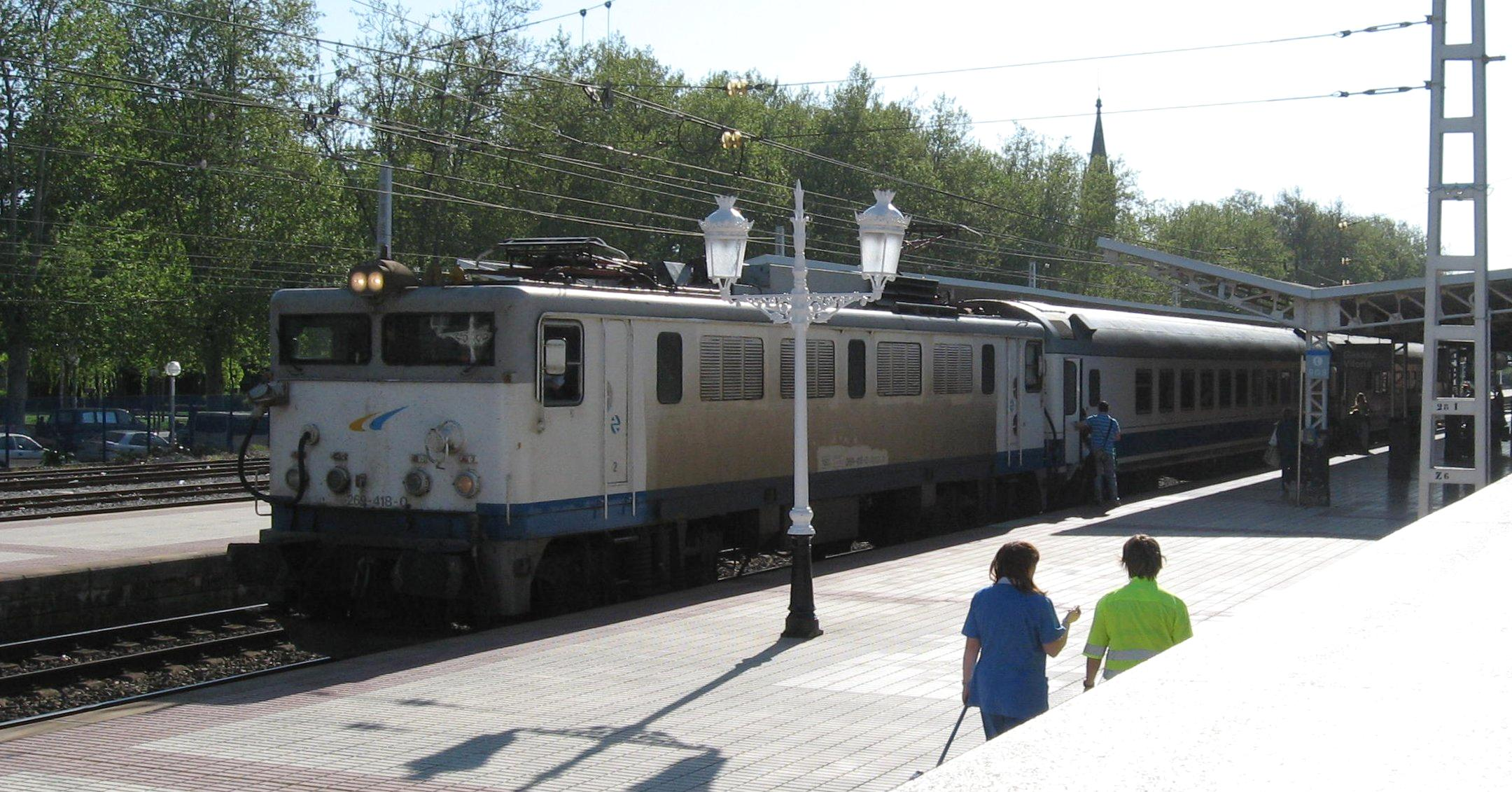 Desc: Locomotora 269.418 en la estación de Vitoria